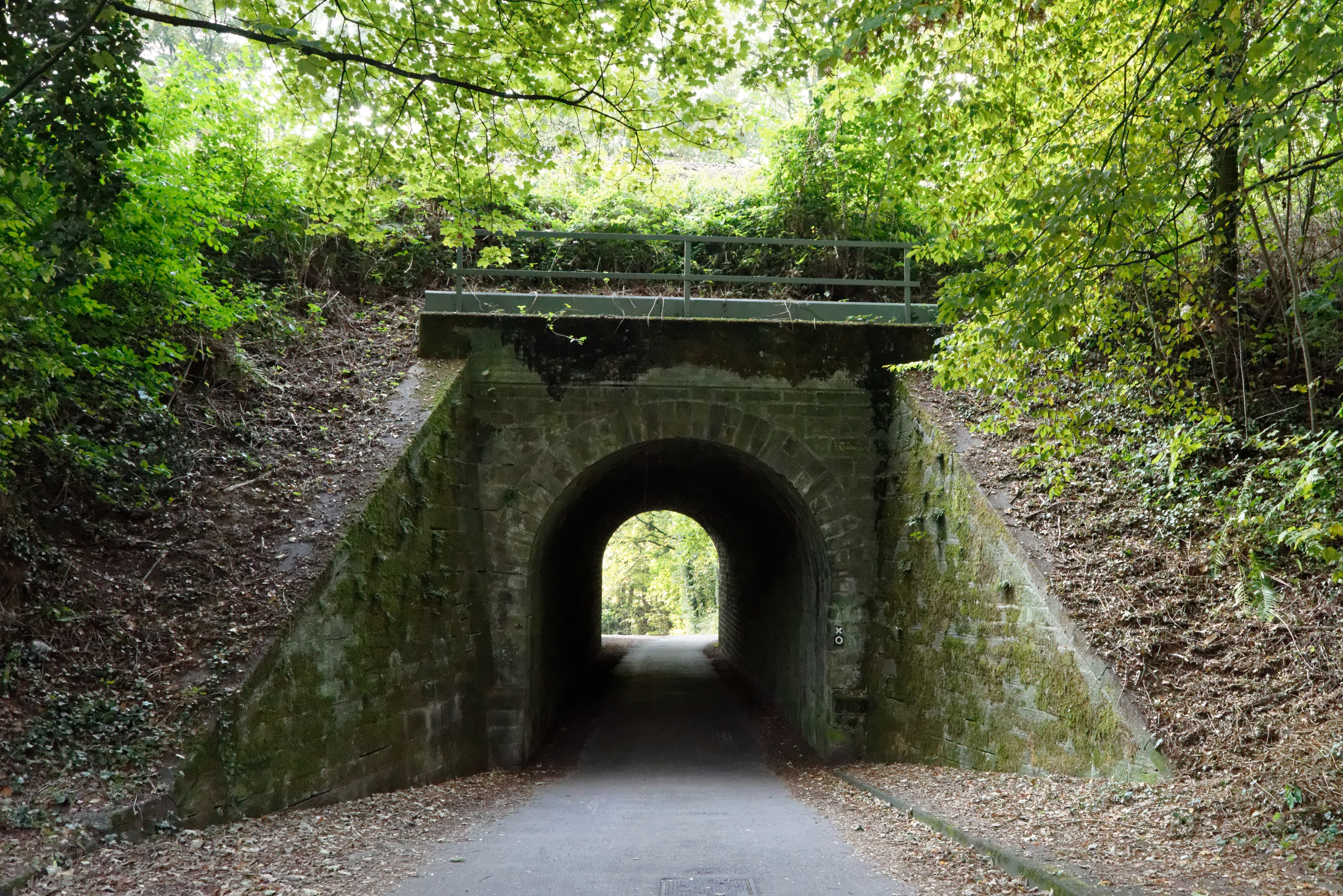 Eisenbahntunnel Brucherkotten